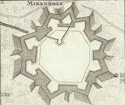 Le fortificazioni di Mirandola durante la guerra di successione polacca nel 1734 (particolare dall'incisione di Matthäus Seutter, Theatrum belli per Italiam A.° MDCCXXXIV)